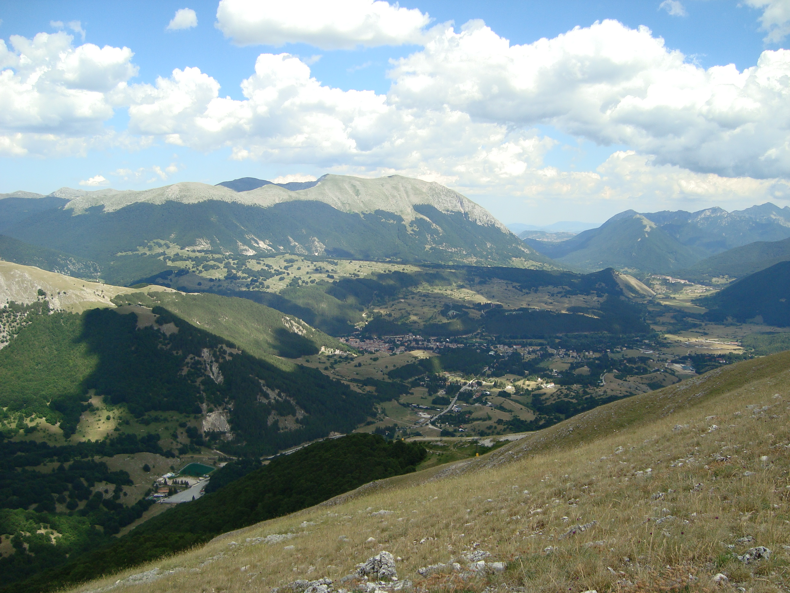 Pescasseroli, Abruzzo from Monte delle Vitelle